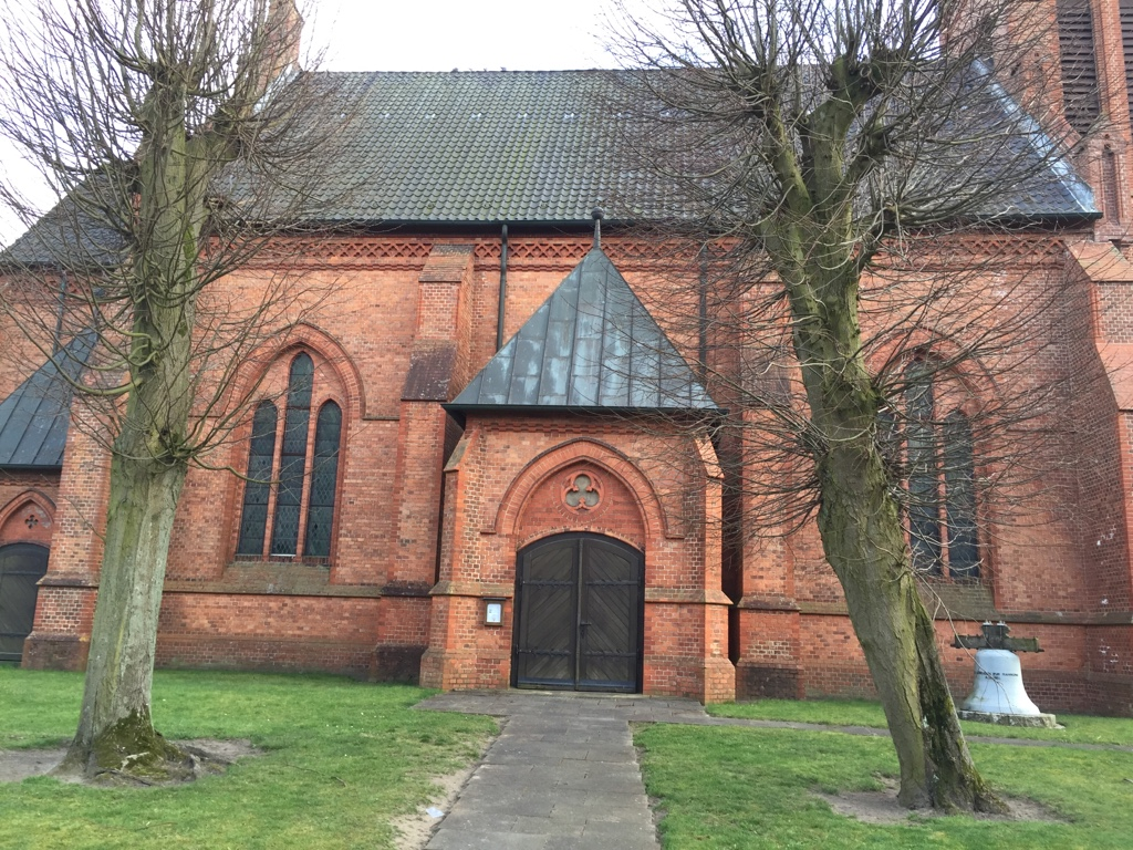 St.-Dionys-Kirche in Lehmke, Backsteinbau in neugotischem Stil